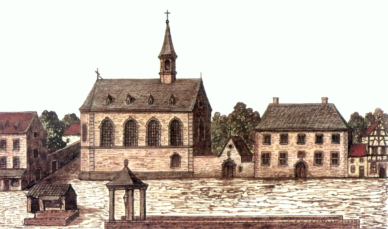 ehemaliges Weißfrauenkloster in der Aachener Jakobstraße vum 1650